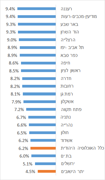 מספר הרשומים למילואים כשיעור מהיהודים תושבי היישוב, 2016